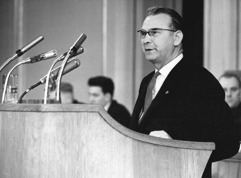 Zentralbild/Junge 28.3.1962 Volkskammer der DDR berät Volkswirtschaftsplan und Staatshaushaltsplan 1962 - Dr. Lothar Bolz gibt aussenpolitische Erklärung ab Die Volkskammer der Deutschen Demokratischen Republik trat am 28.3.1962 zu ihrer 22. Sitzung zusammen. Zu Beginn gab der Minister für Auswärtige Angelegenheiten, Dr. Lothar Bolz, eine Erklärung zu aussenpolitischen Fragen ab. Im Mittelpunkt der Volkskammersitzung stehen die erste und zweite Lesung des Beschlusses der Volkskammer über den Volkswirtschaftsplan 1962 und des Gesetztes über den Staatshaushaltsplan 1962. UBz.: Der Vorsitzende der Staatlichen Plankommission, Minister Karl Mewis, begründet den Beschluß über den Volkswirtschaftsplan 1962.